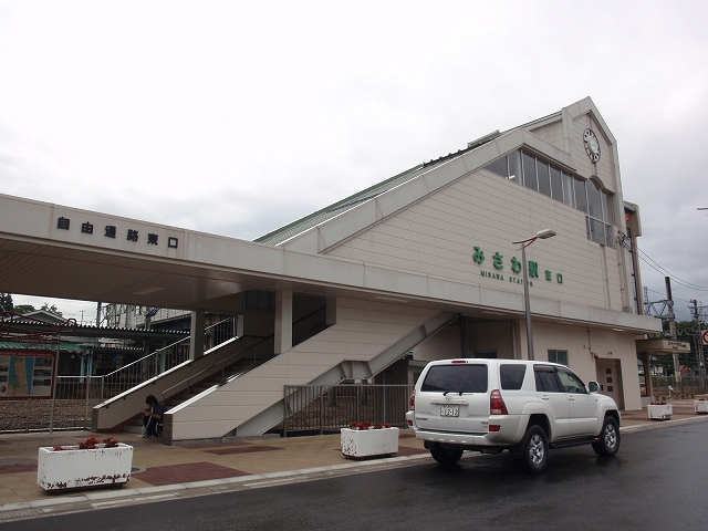 三沢駅東口